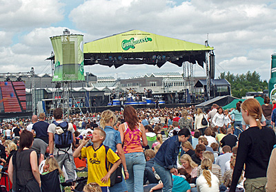 Grøn Koncert i Århus, Denmark, 2005